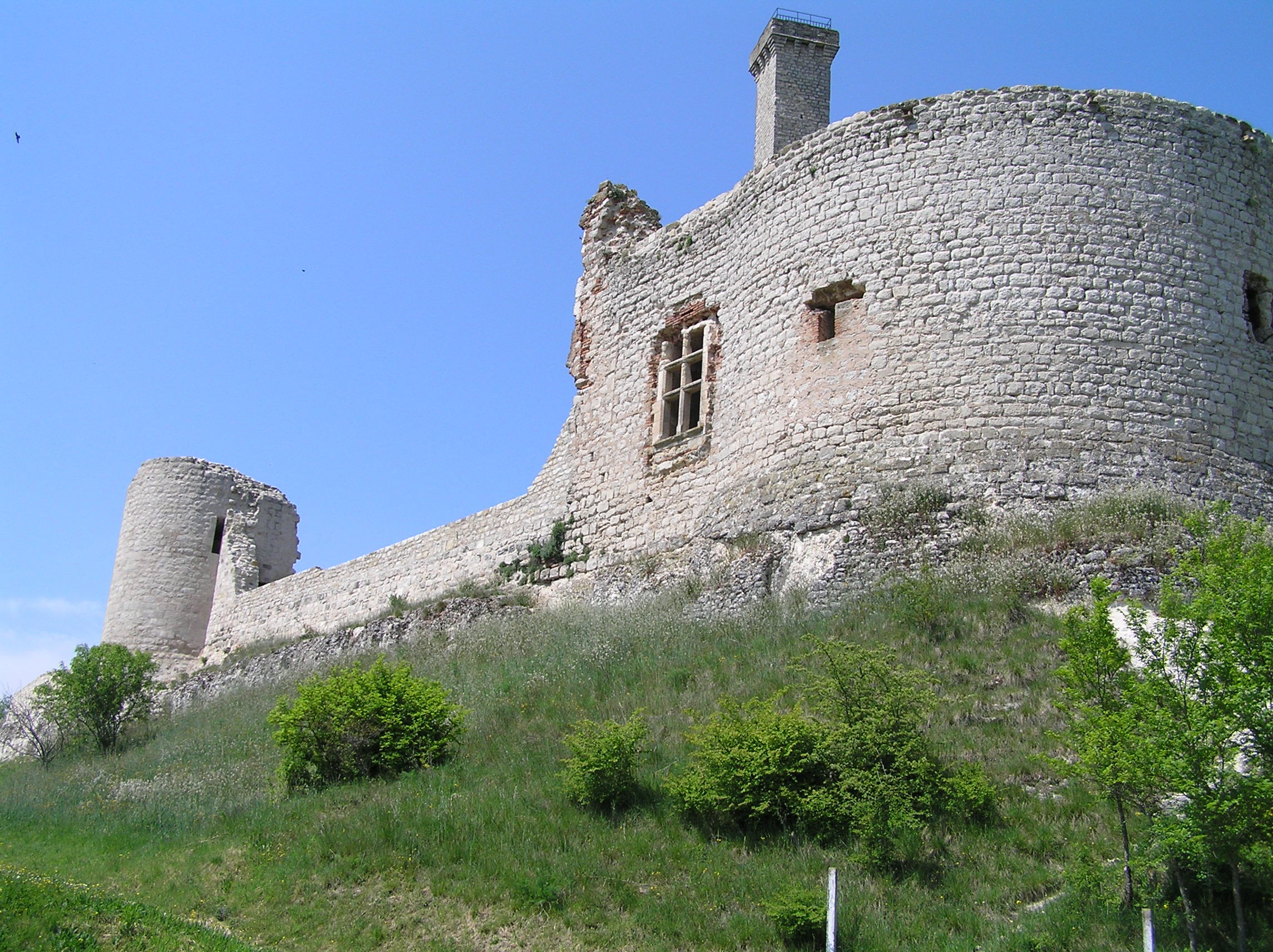 Ruines du château de Castelnau de Levis